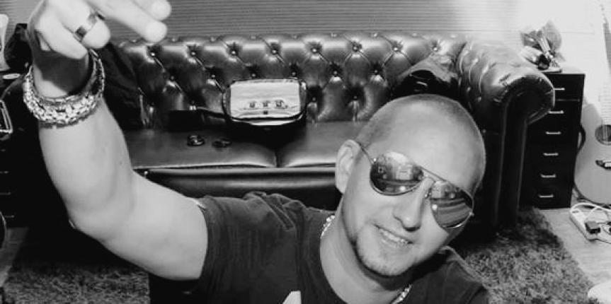 Ben Mühlethaler